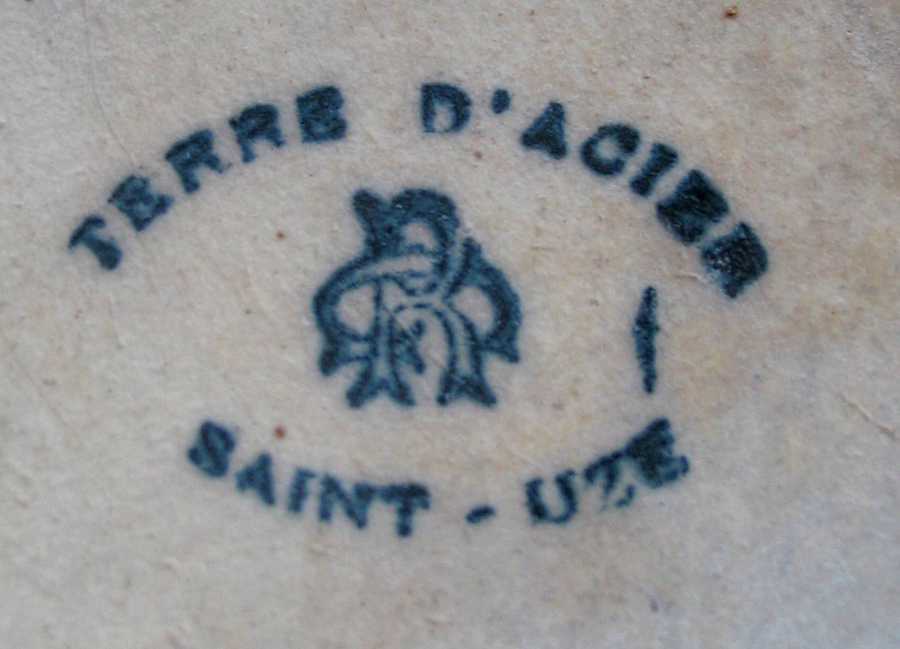 Terrine en grès, Saint-Uze, France, vers 1900. Signature "Terre d'acier". Manufacture Revol